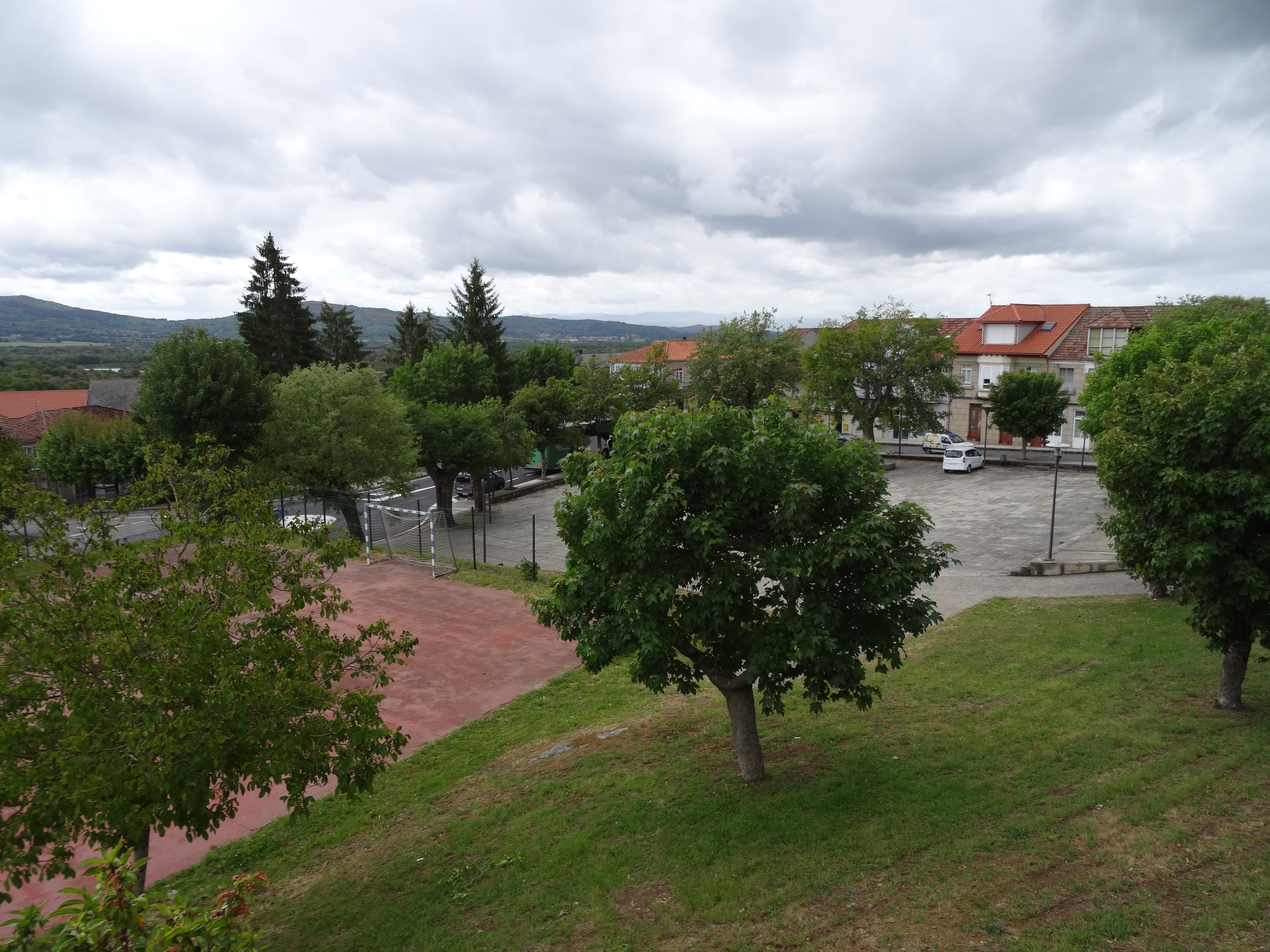 Ver título.